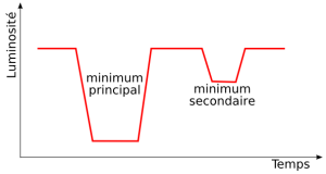 Shéma montrant la courbe de lumière théorique d'une étoile binaire à éclipses.